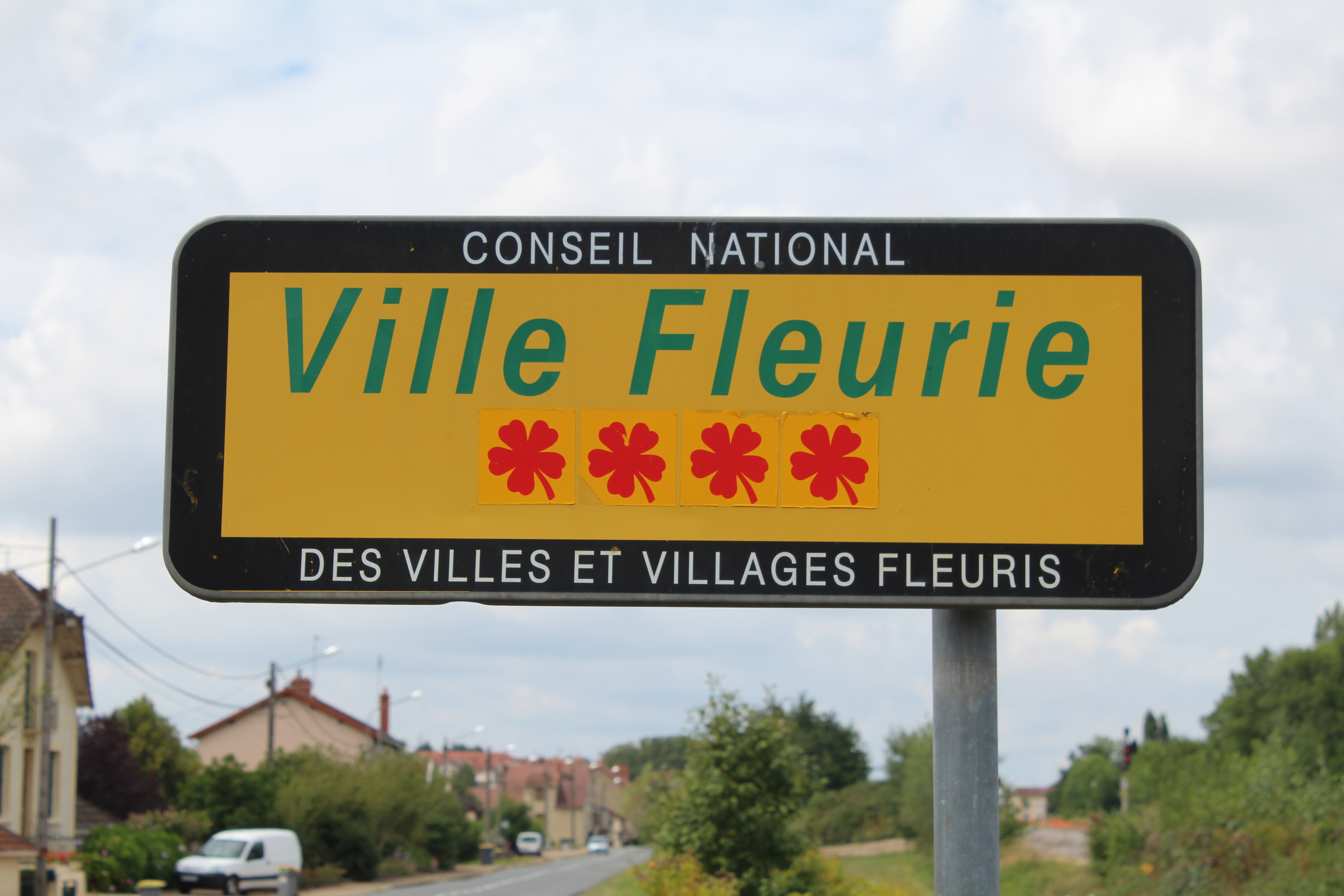 Panneau Ville fleurie avec 3 fleurs, Paray-le-Monial.